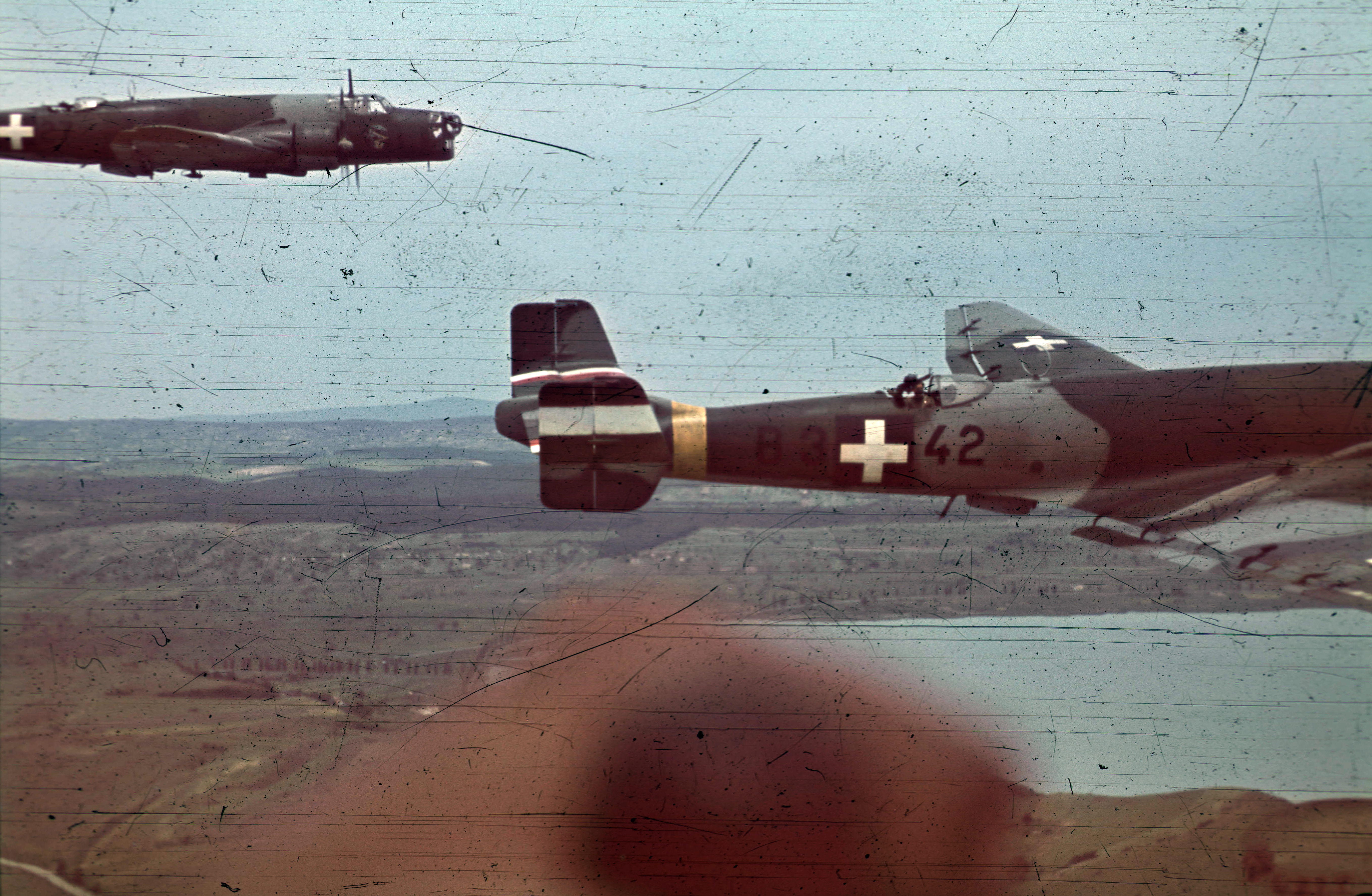 A Magyar Királyi Honvéd Légierő Junkers Ju 86K-2 típusú repülőgépei. Tags: Royal Hungarian Air Force, Junkers-brand, military, airplane, transport, colorful, second World War, Gerrman brand Title: A Magyar Királyi Honvéd Légierő Junkers Ju 86K-2 típusú repülőgépei.